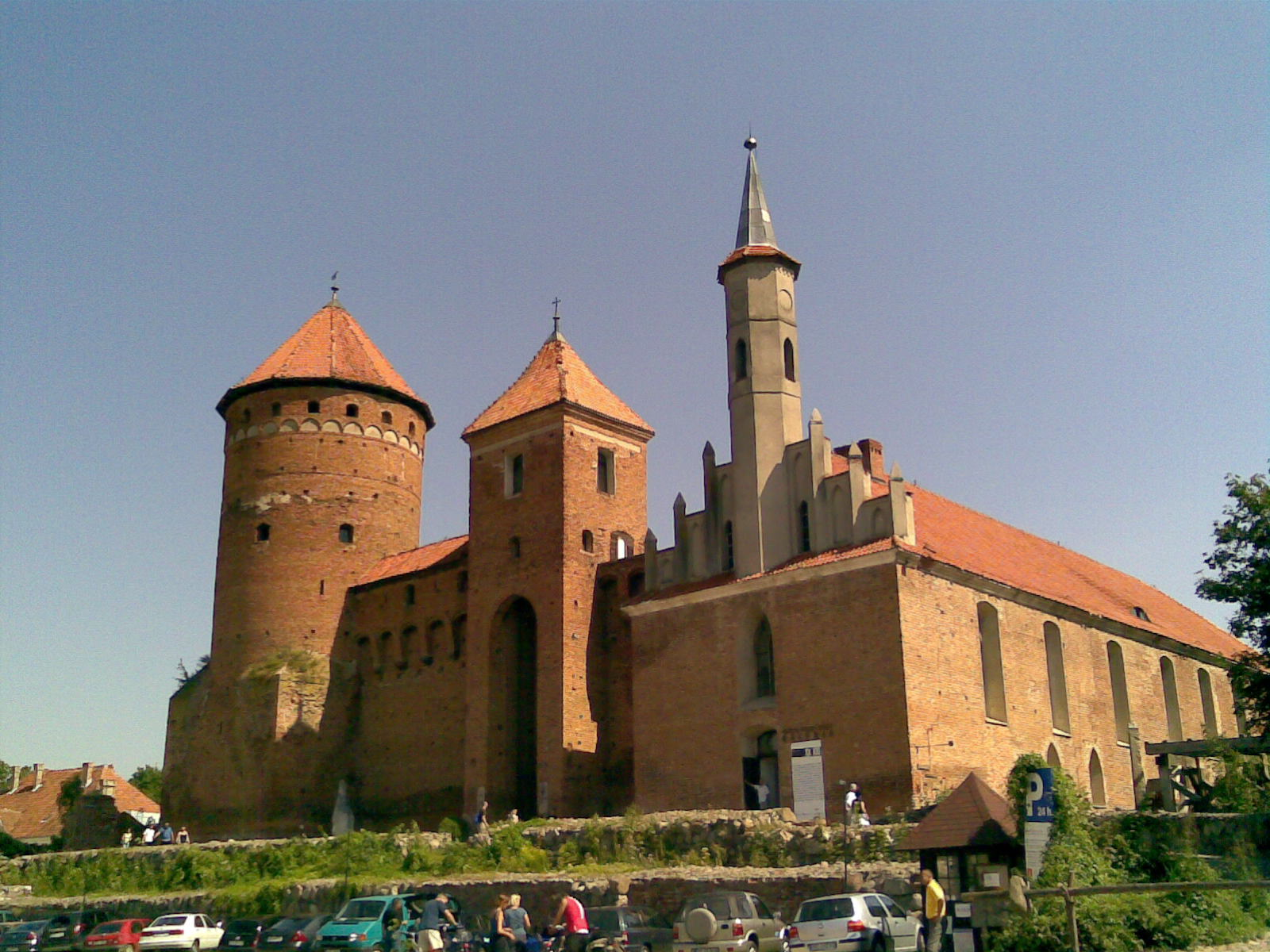 Reszel, zamek biskupi, XIV, XIX